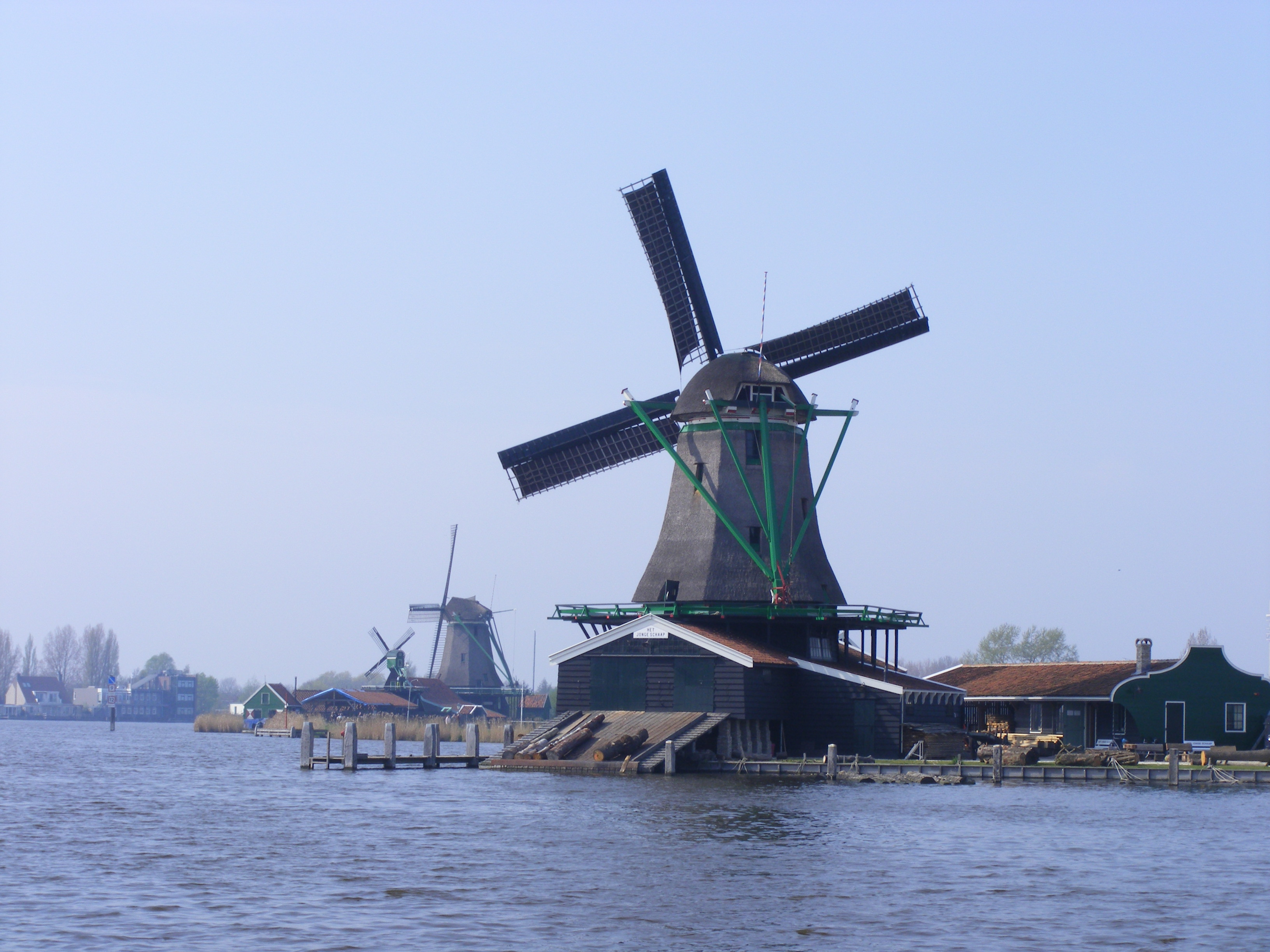 Houtzaagmolen 'Het Jonge Schaap' aan de Kalverringdijk (Zaanse Schans) te Zaandam